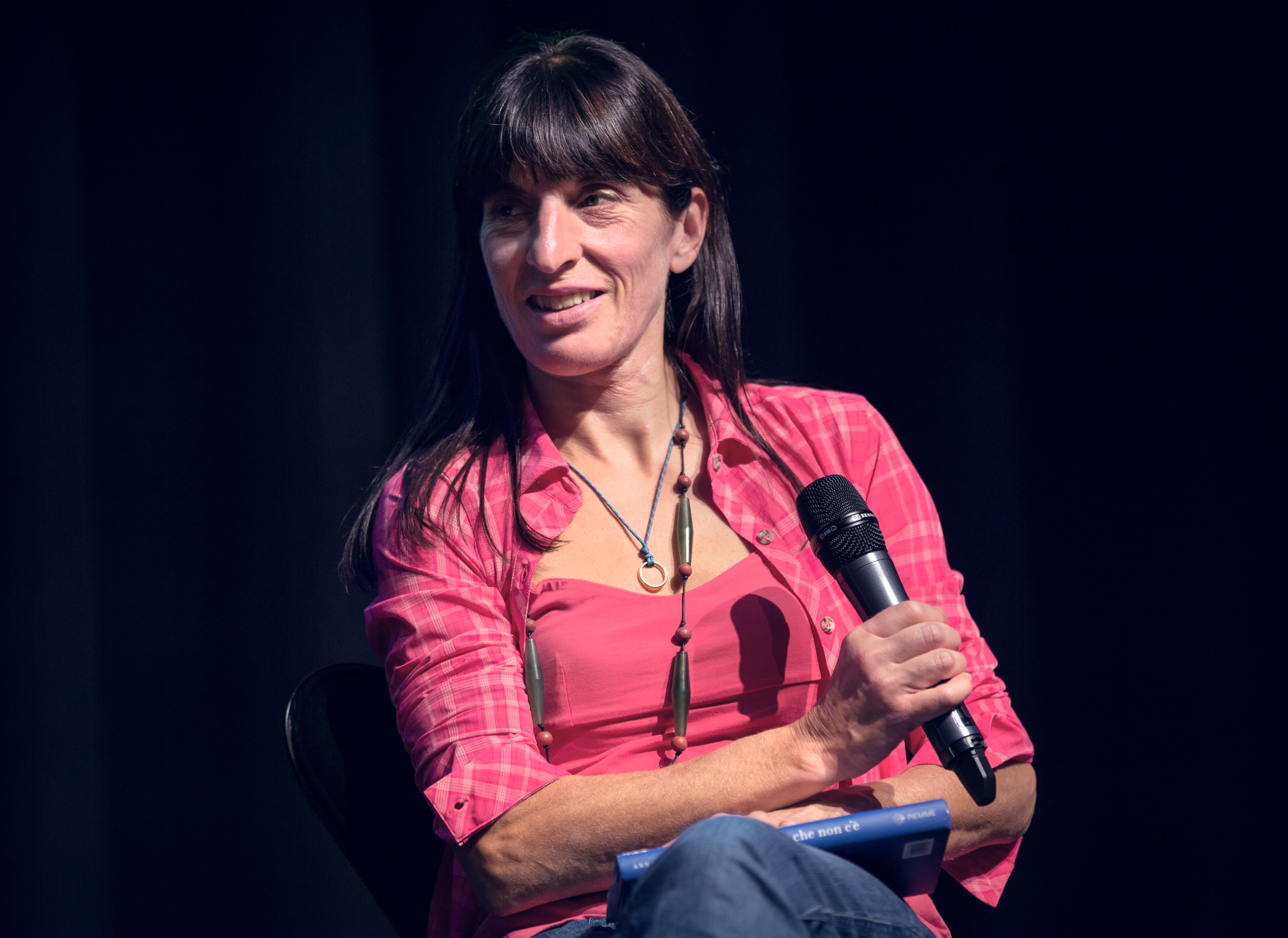 Anna Torretta